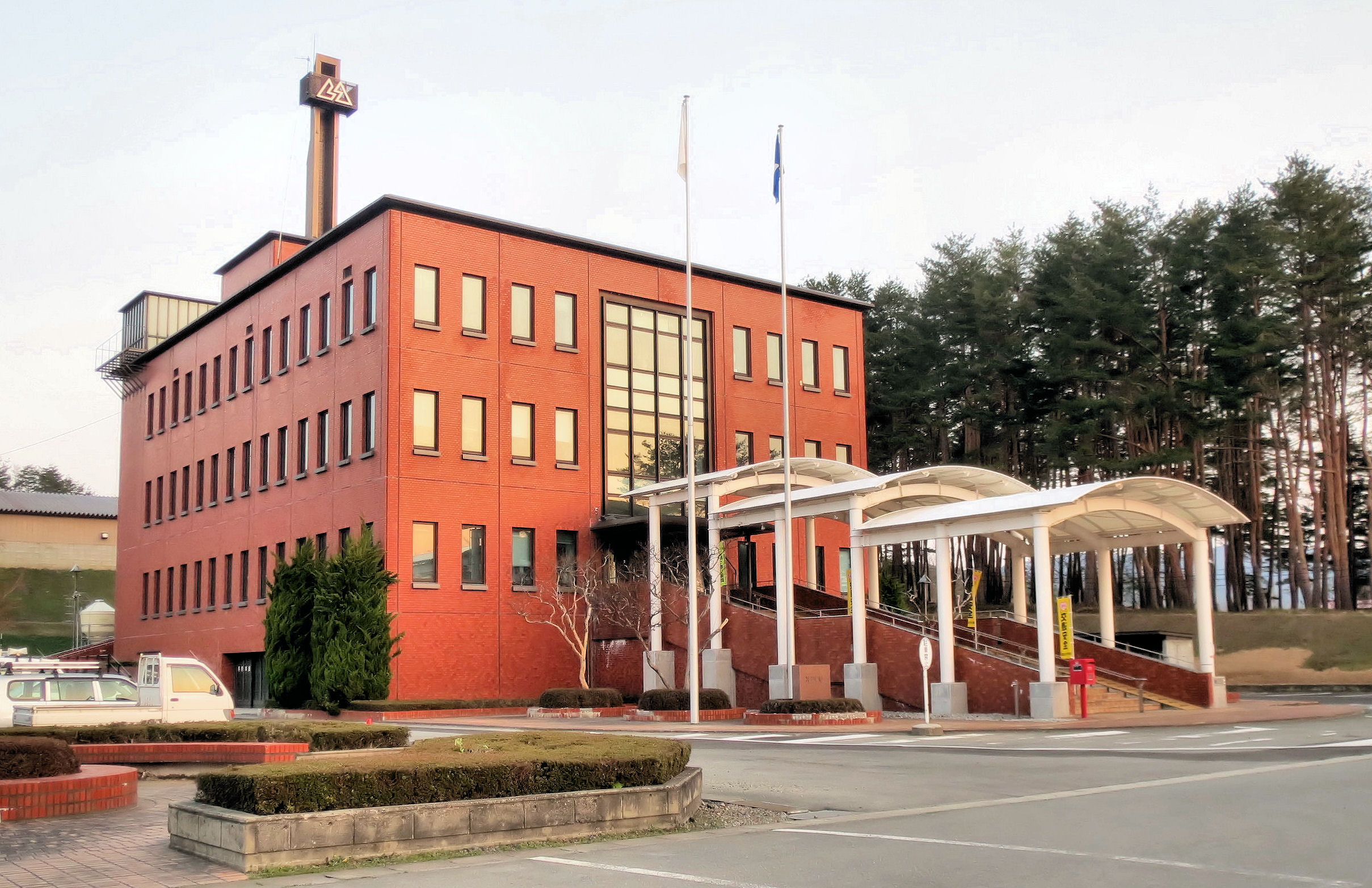 飯豊町役場（山形県西置賜郡飯豊町）